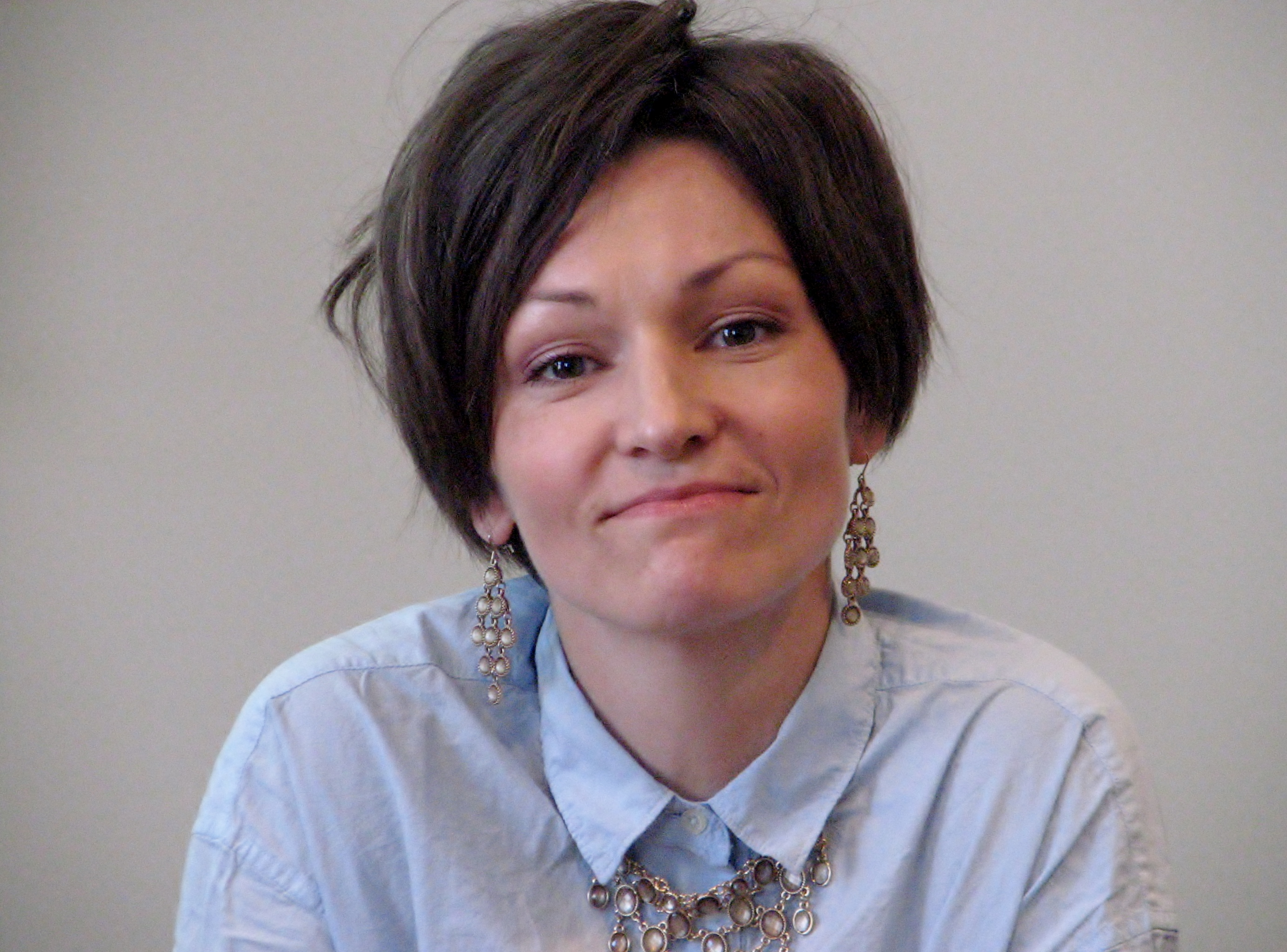 Yoko Alender Nordic Hotel Forumis 7. mail 2014 toimunud konverentsil "Tahan last, aga normaalset meest ei ole!"